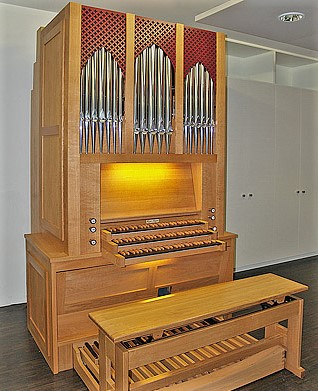 Mayer-Orgel in der Musikschule Dudelange